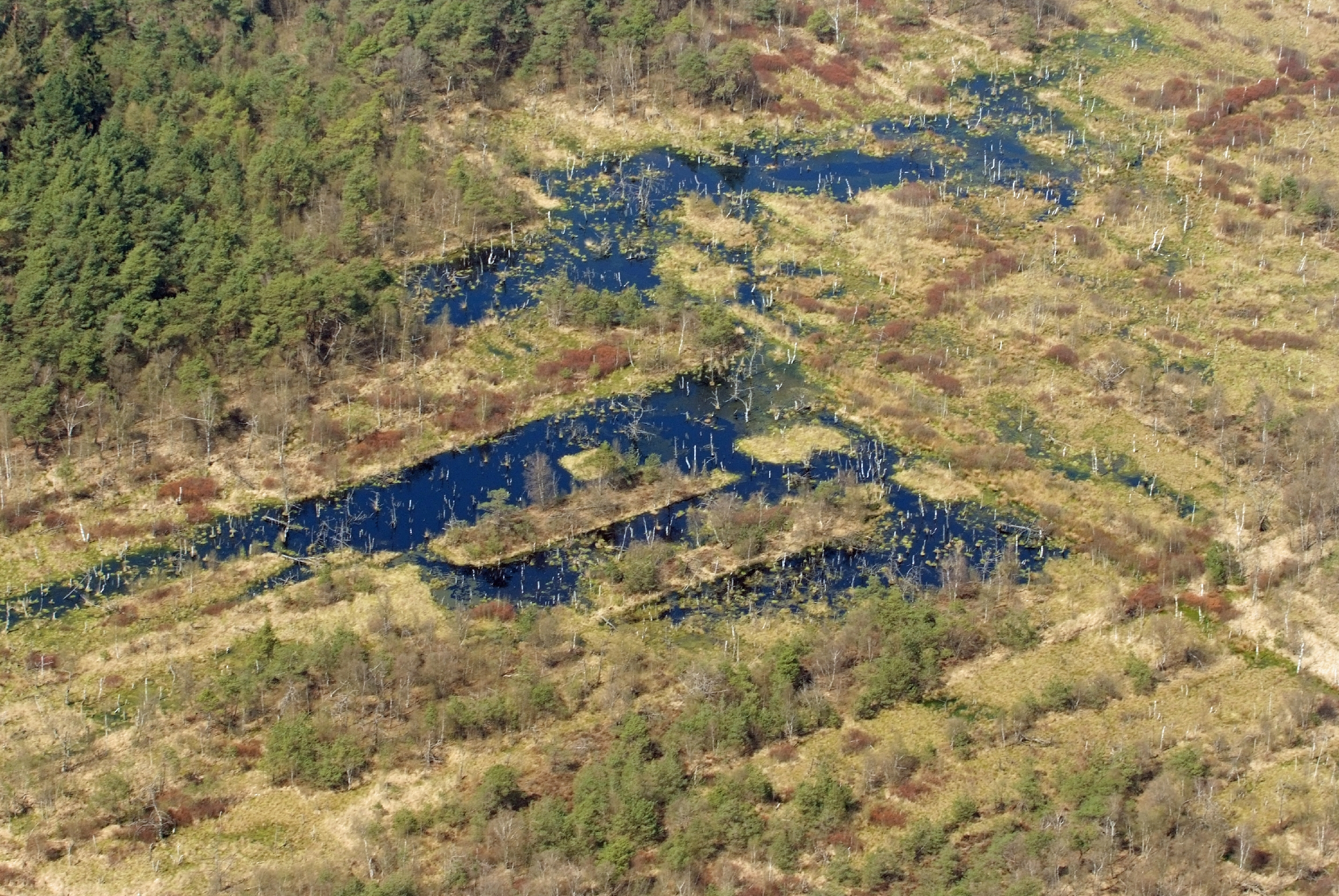 Dorumer Moor / Fotoflug von Nordholz-Spieka nach Oldenburg und Papenburg